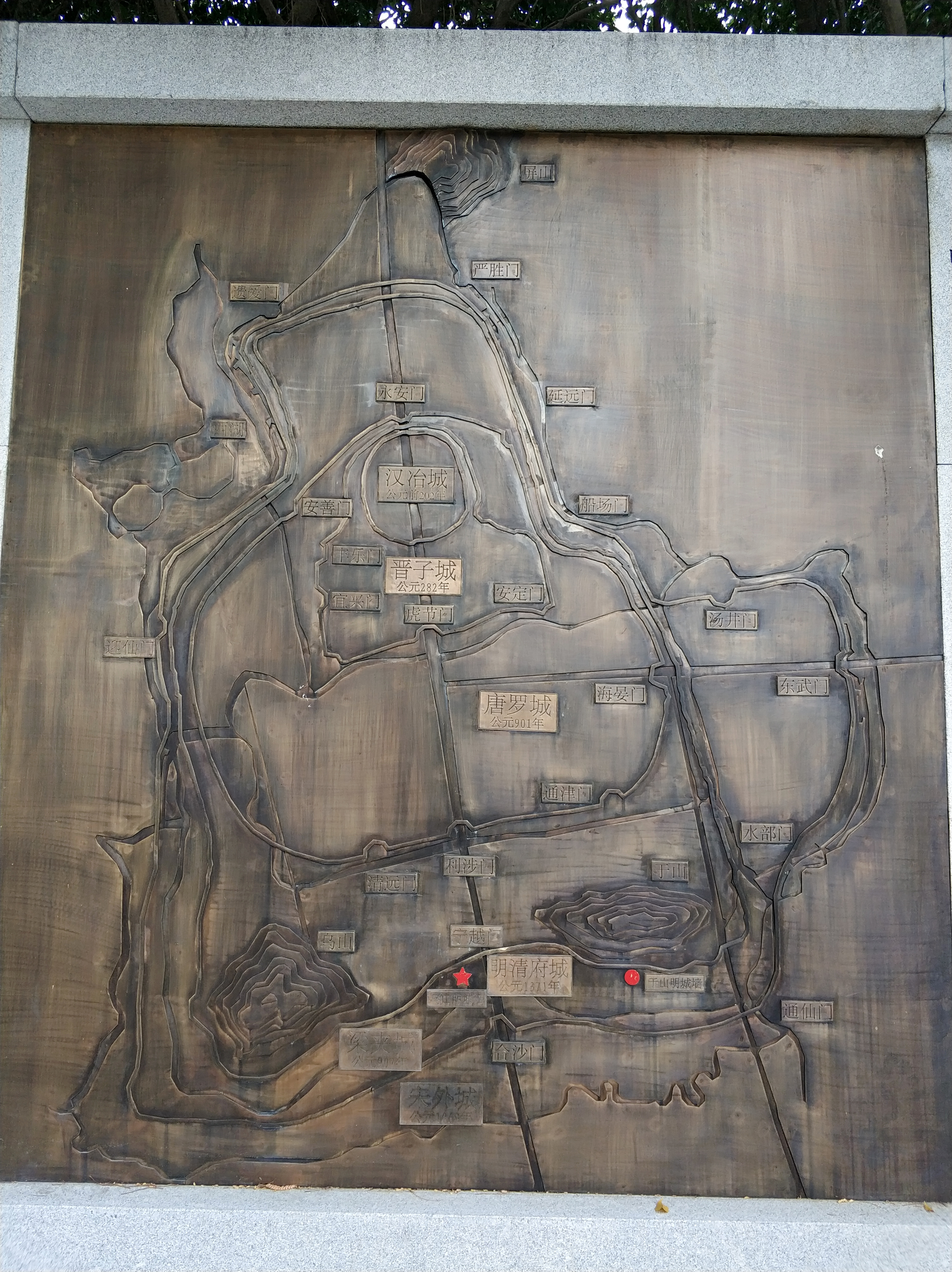 中文（中国大陆）: 福州乌山路八一七路口西北乌山明城墙遗址